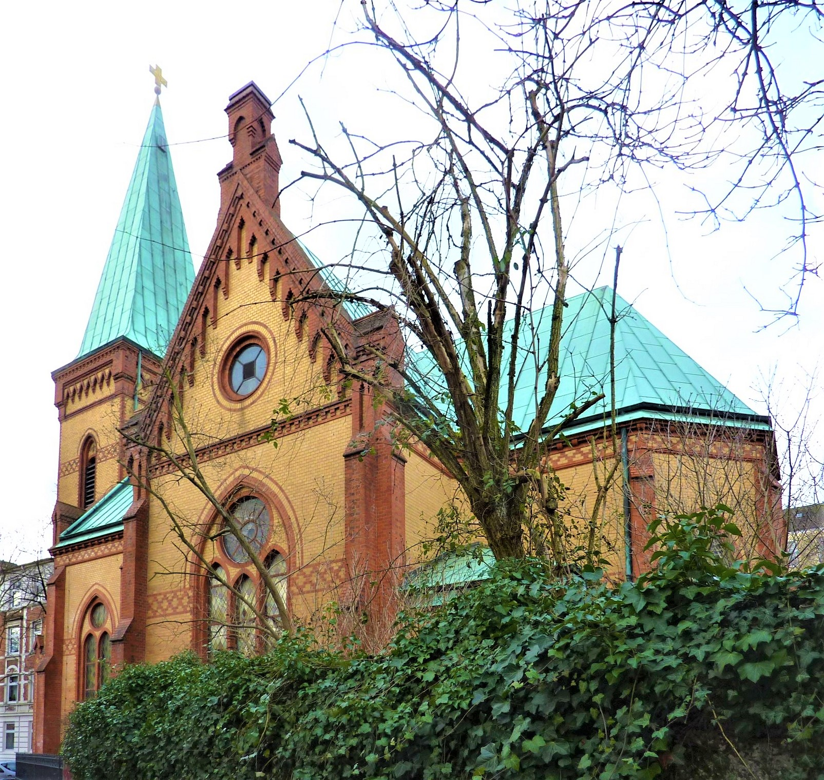 Kirche der Stille (vorm. Christophorus-Kirche; Hamburg-Altona-Nord)